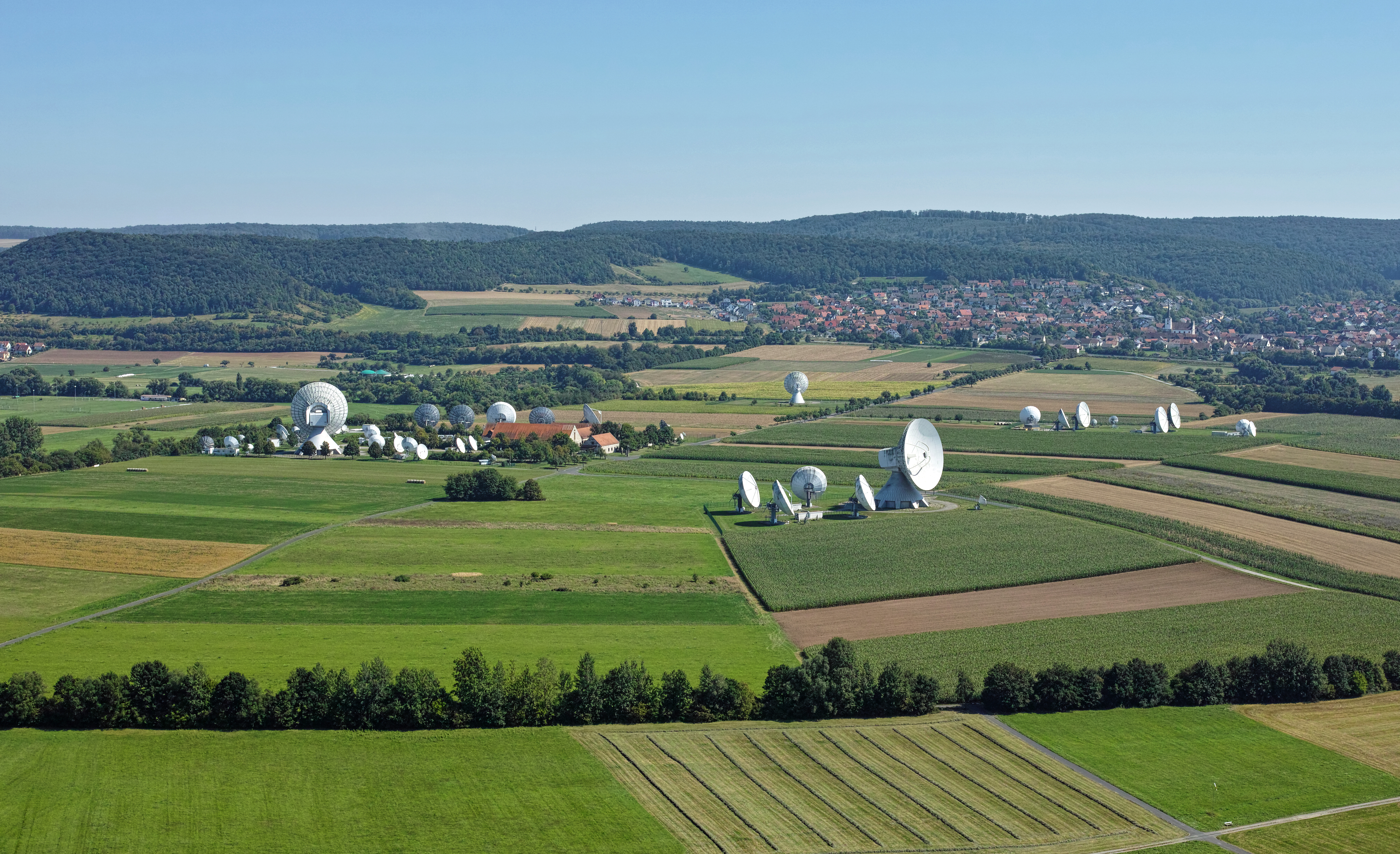 Die Erdfunkstelle Fuchsstadt vom 100 m höheren Hammelberg aus. Die Erdfunkstelle befindet sich im unterfränkischen Landkreis Bad Kissingen auf dem Gebiet der Gemeinde Fuchsstadt. Sie wurde von der Deutschen Bundespost gebaut und wird derzeit vom US-amerikanischen Unternehmen Intelsat betrieben. Die Erdfunkstelle Fuchsstadt dient als Bodenstation für die Kommunikation mit Nachrichtensatelliten und ermöglicht unter anderem satellitengestützte Telefongespräche, Internet-Verbindungen und Fernsehsendungen. Zurzeit besteht die Erdfunkstelle aus mehr als 50 Parabolantennen, darunter zwei Antennen vom Typ A mit einem Durchmesser von 32 Metern und etwa 25 weitere mit jeweils mehr als 9,3 Metern. Die Erdfunkstelle ist damit eine der größten Satelliten-Kommunikationsanlagen der Welt.